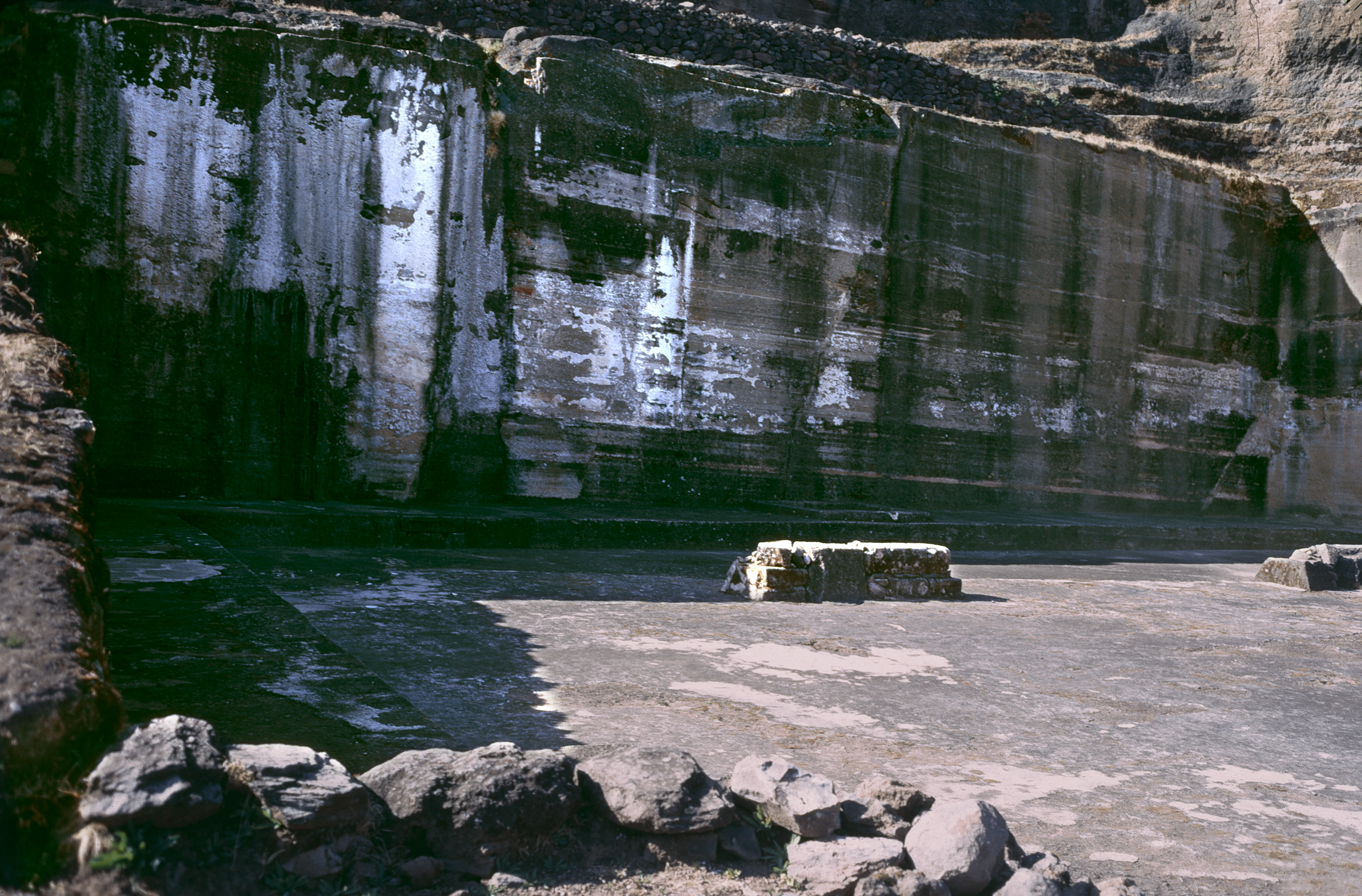 Malinalco, Edo. de México, Mexiko: building 4